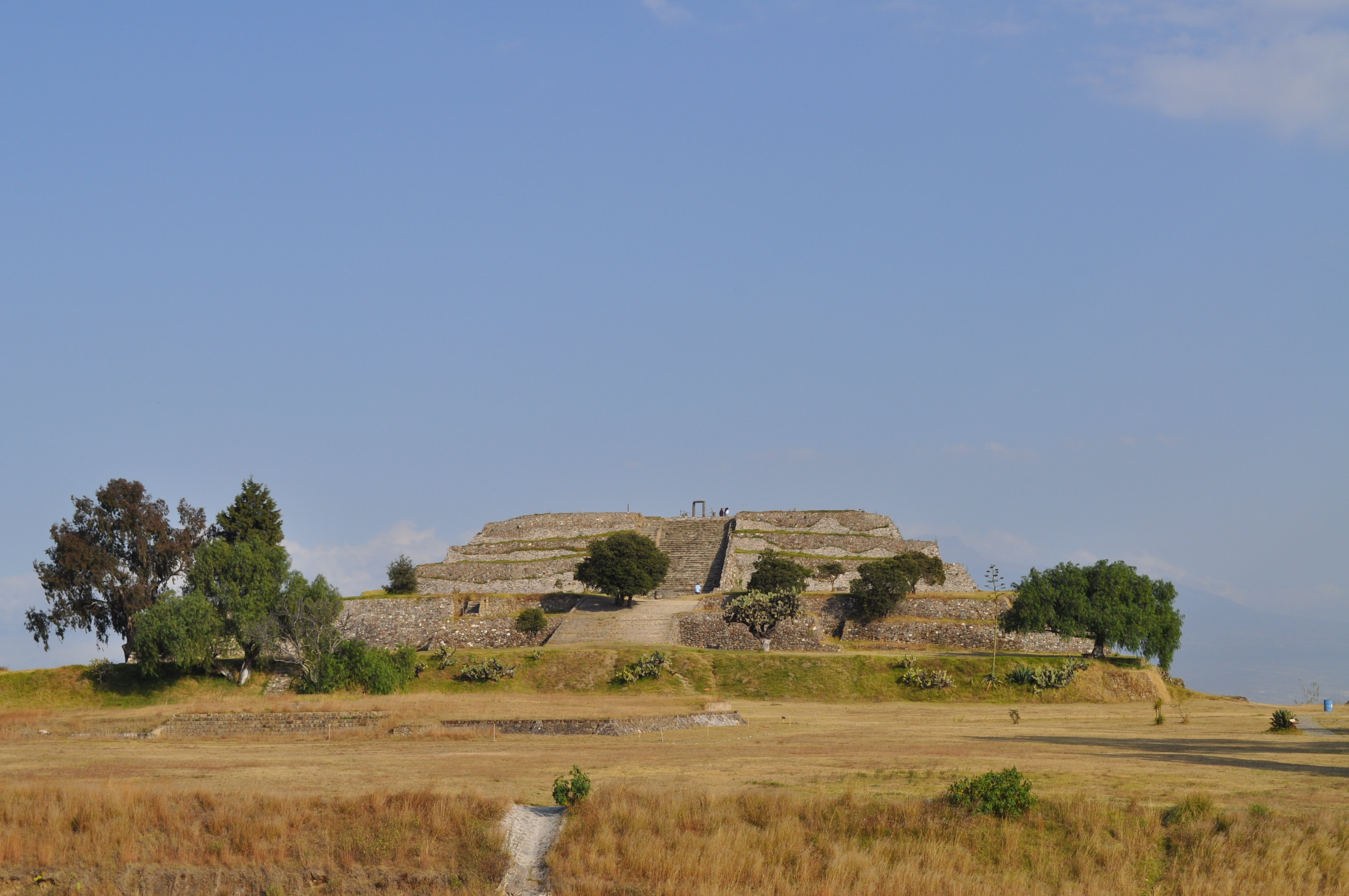 Xochitecatl